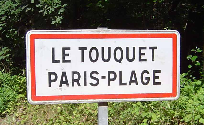 photo prise par moi-même le 30 juillet 2006